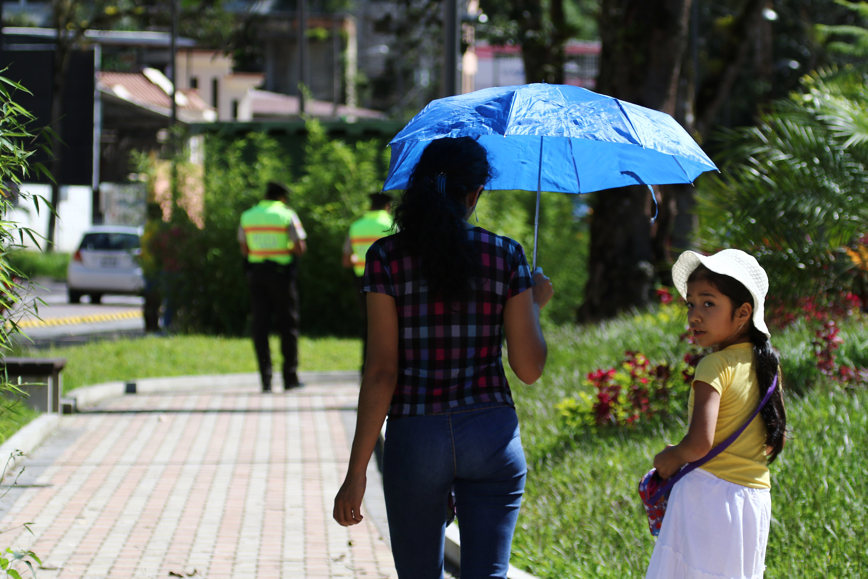 Zamora, Zamora Chinchipe 22 Jul (Andes).- El nuevo parque lineal en la ciudad de Zamora, una obra del gobierno central que disfrutan ciudadanos de la provincia y la ciudad. Fotografías: Carlos Rodríguez/Andes.